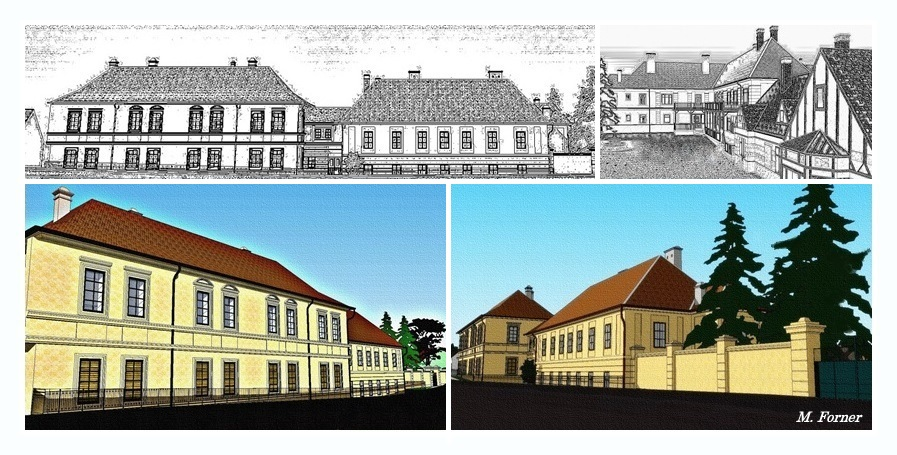 Bývalý kaštieľ v Smoleniciach.